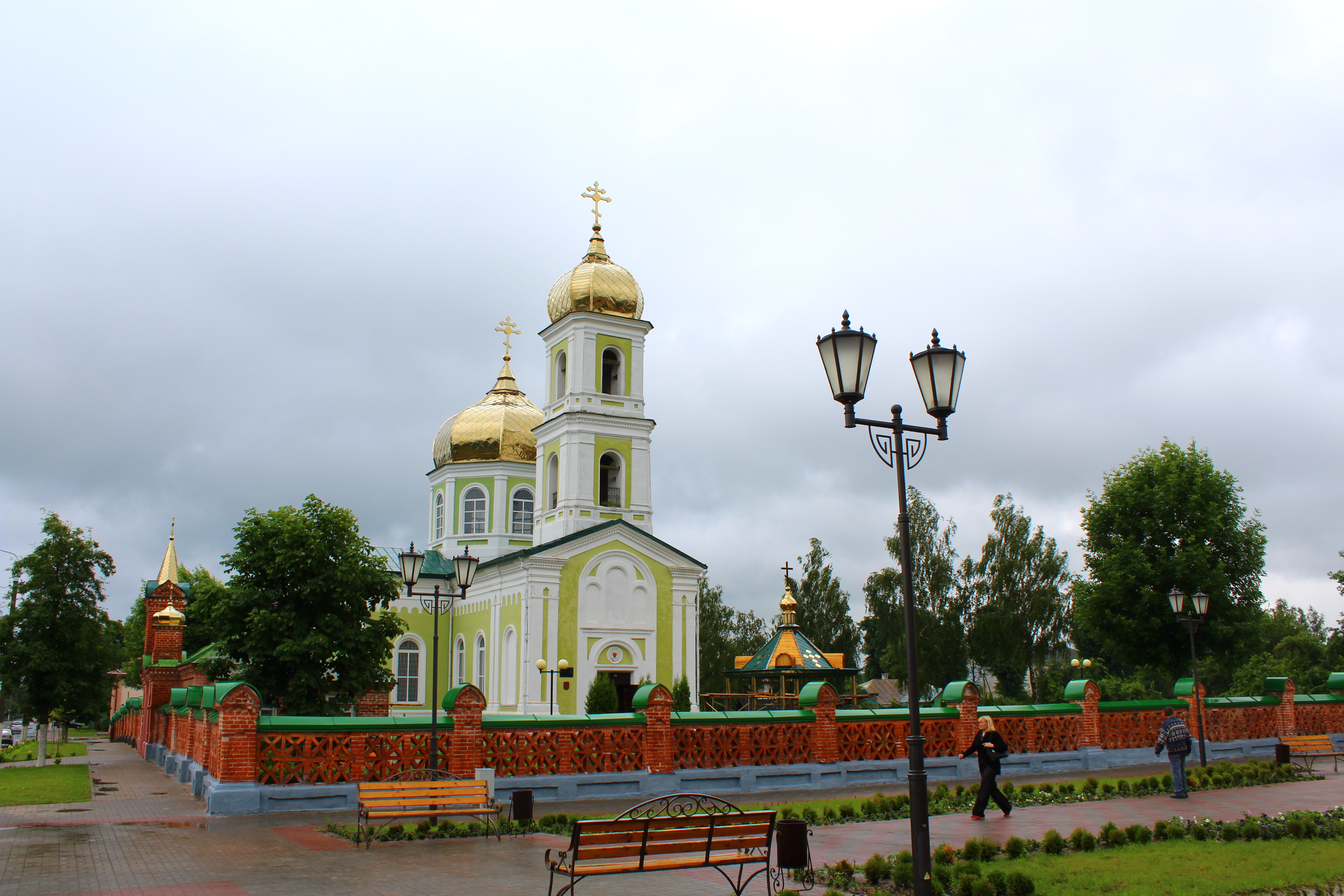 Мсціслаў. Краявіды